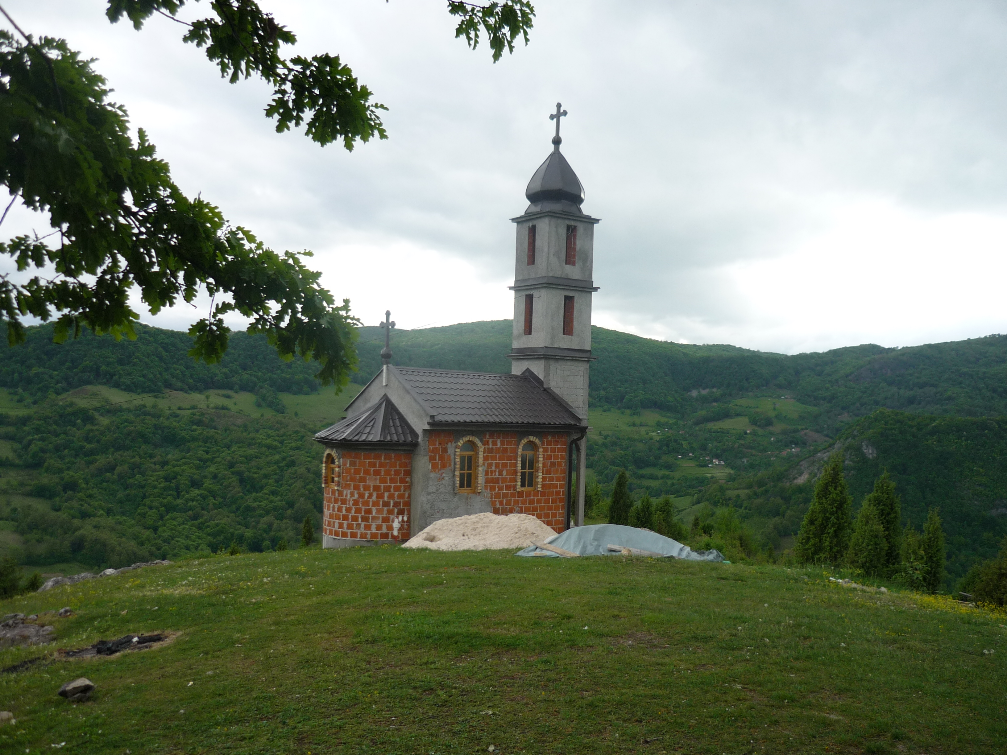 Crkva u Tupanarima